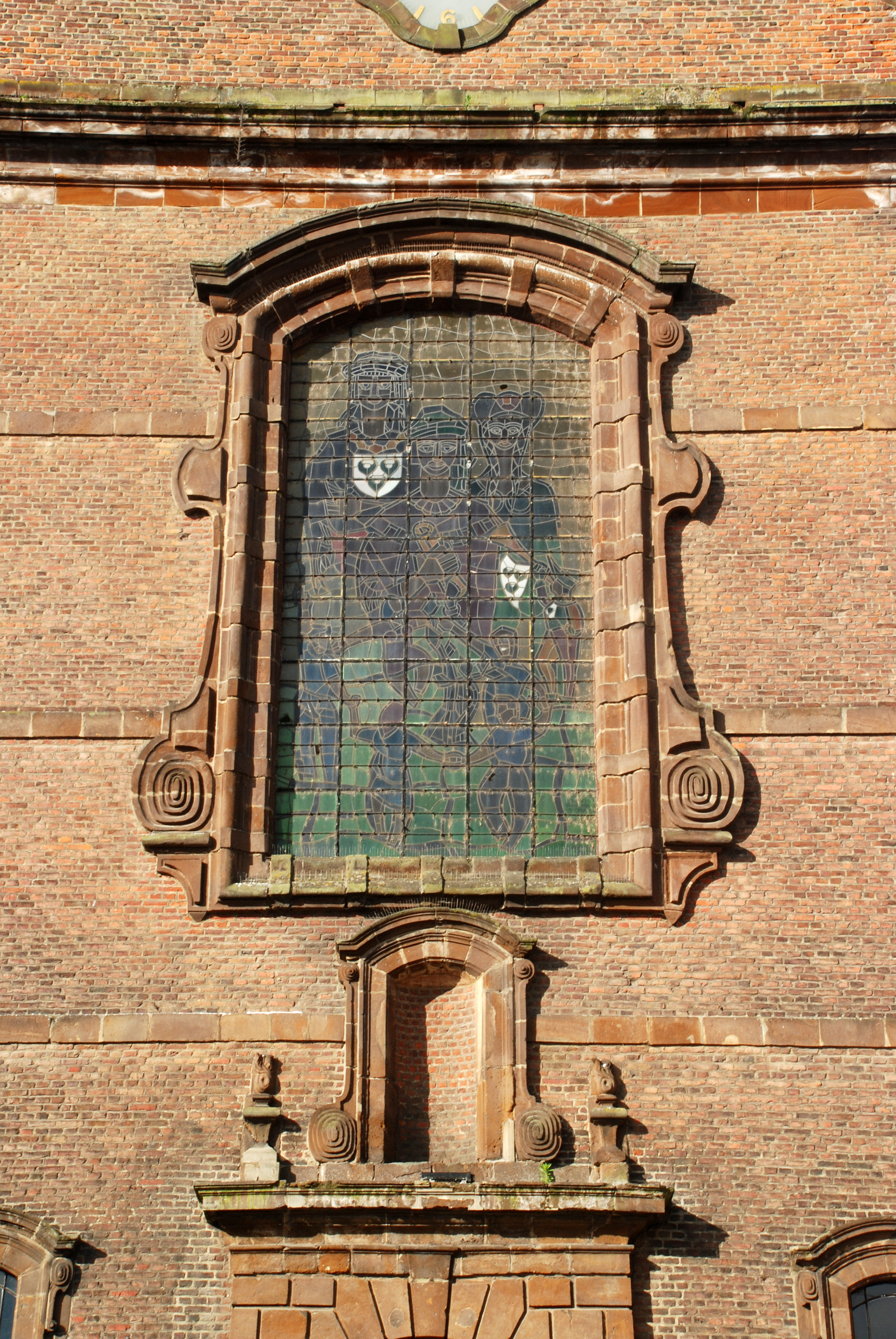 Belgique - Wallonie - Wavre - Ancien couvent des Carmes Chaussés (actuel hôtel de ville)